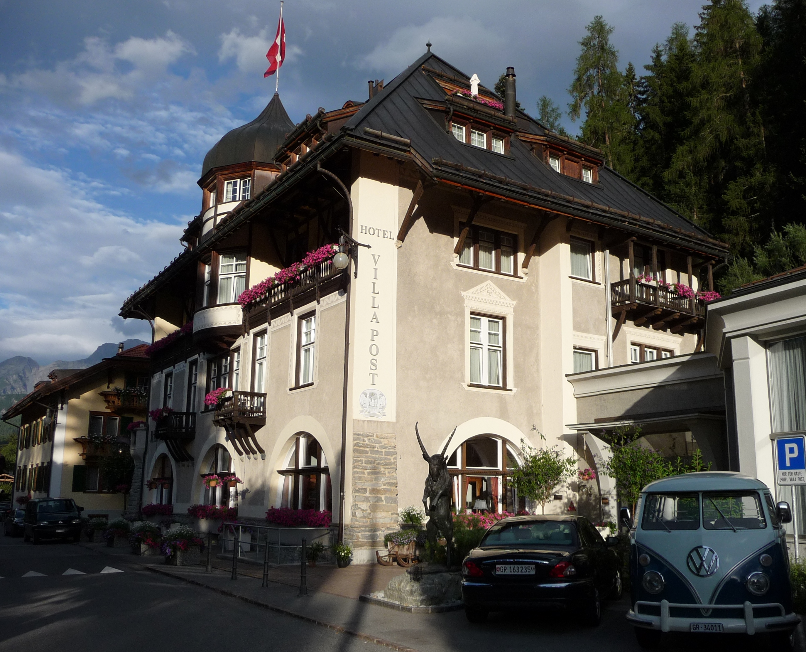 Hotel Villa Post in Vulpera erbaut 1901 als Postbüro von Vulpera